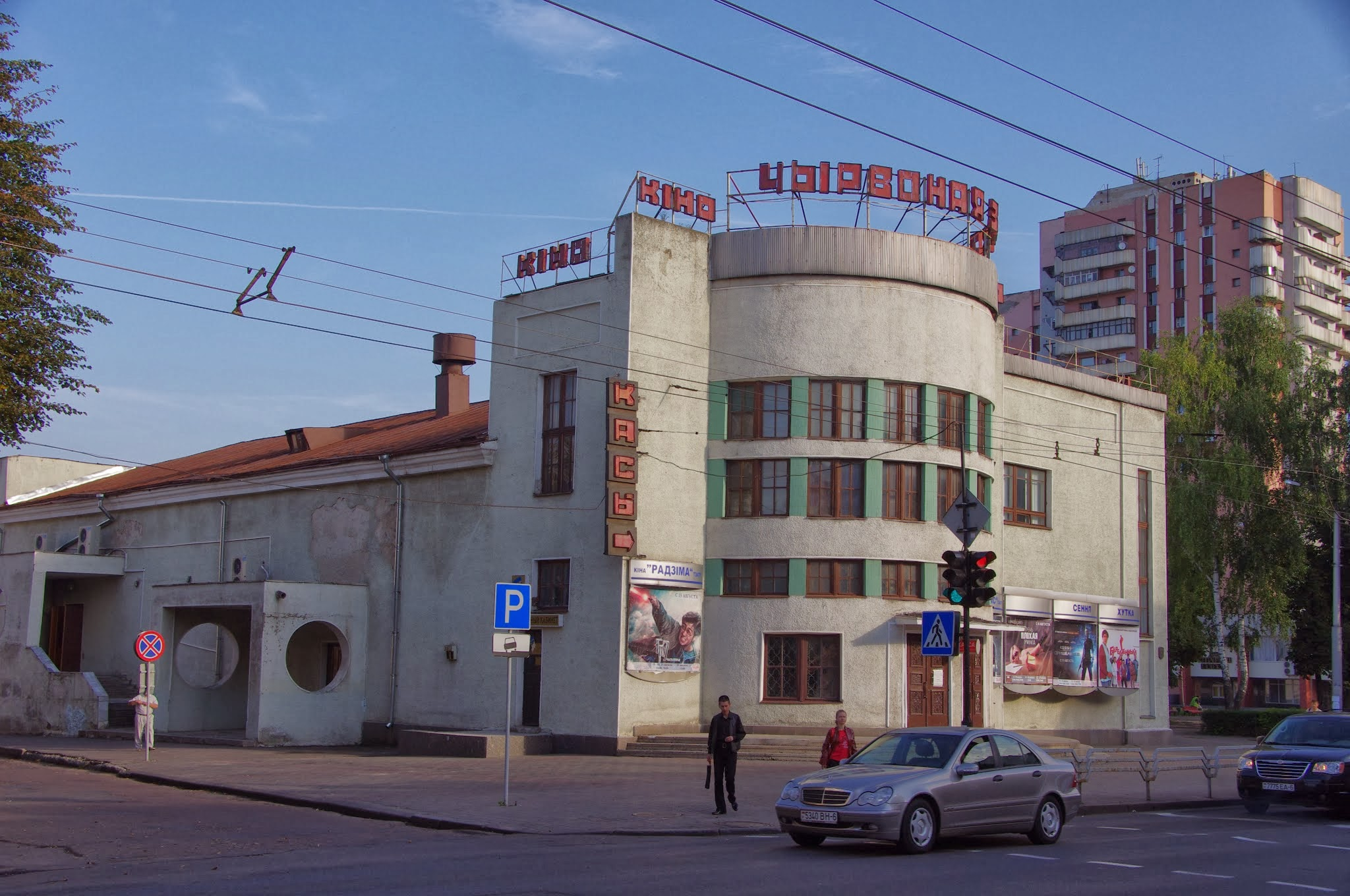 Lieninski District, Mogilev, Belarus